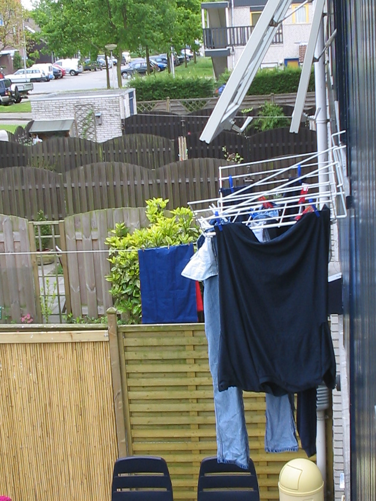 wasrek